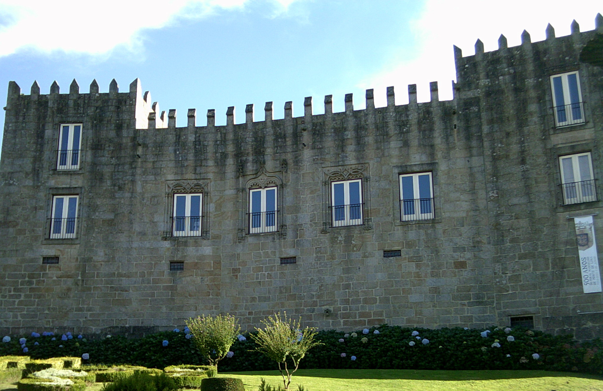 Paços do Marquês, freguesia, cidade e concelho de Ponte de Lima, concelho de Viana do Castelo, Portugal.